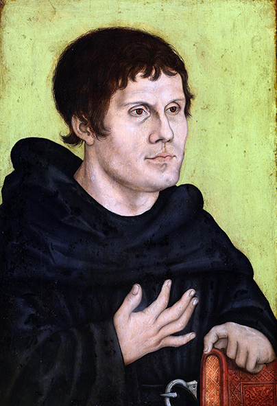 Martin Luther (1483-1546), huile sur toile de Lucas Cranach l'Ancien, 1528.